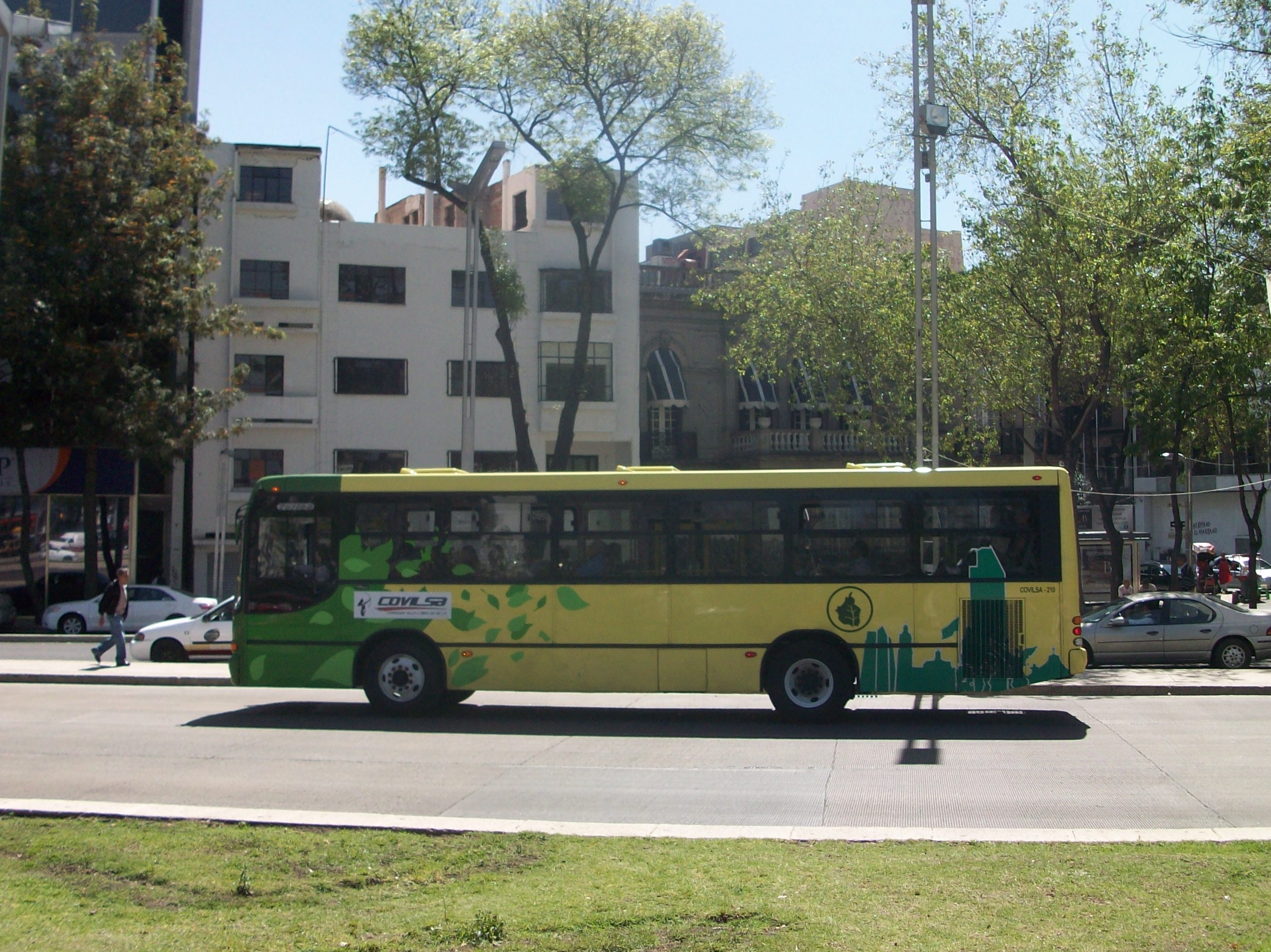 Autobuses de Reforma